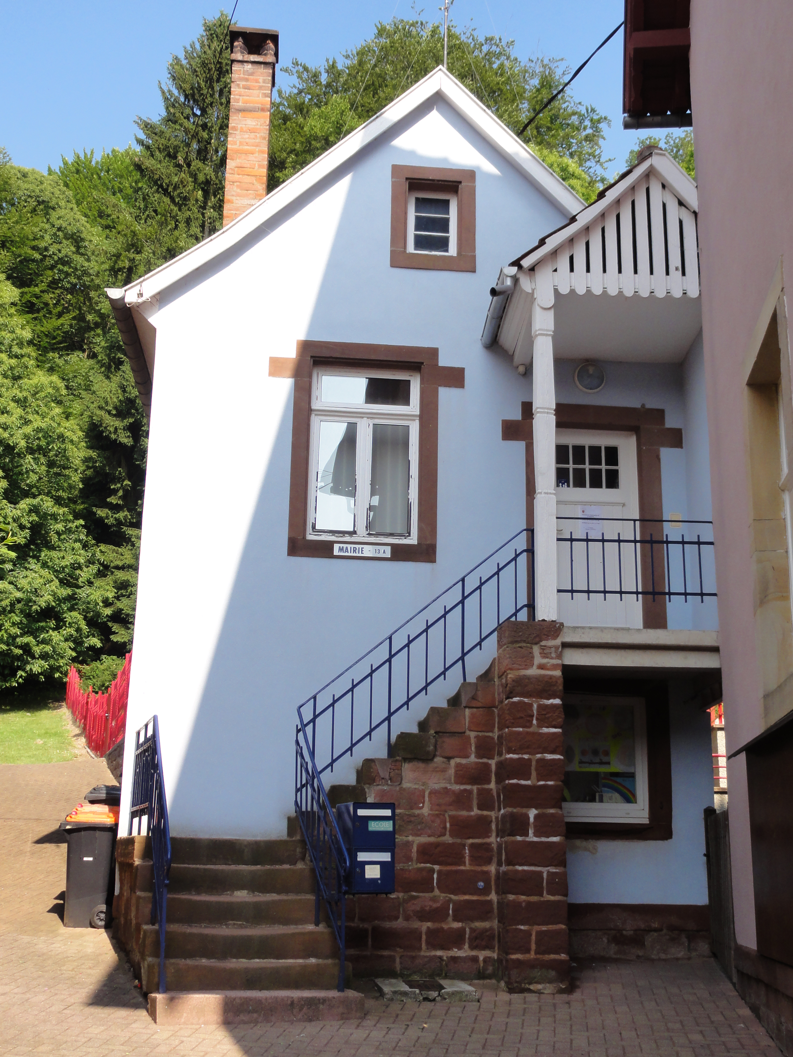 Alsace, Bas-Rhin, Reinhardsmunster, Mairie, rue Principale.